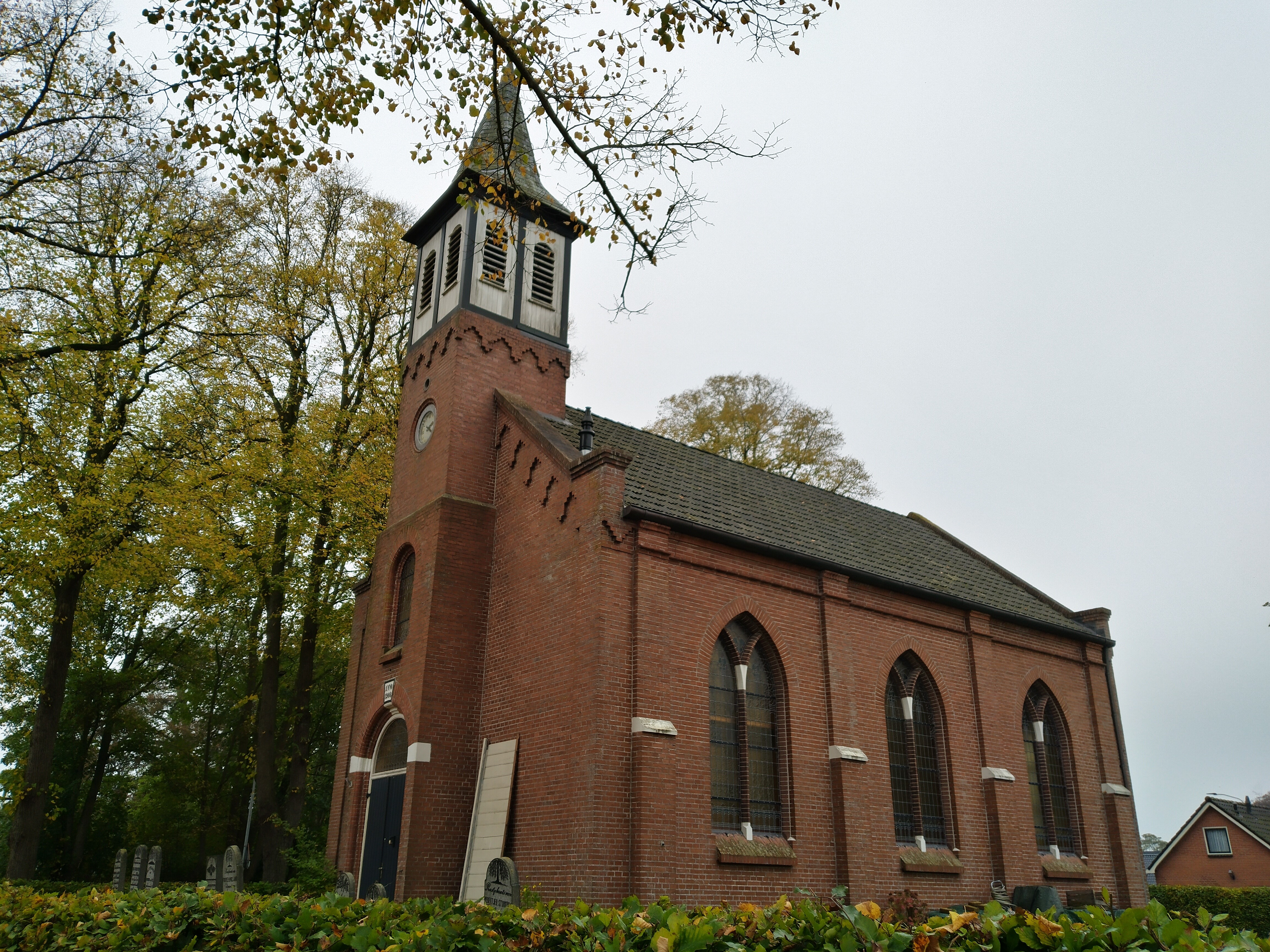 Voormalige hervormde kerk van Oostwold, Westerkwartier, Groningen.